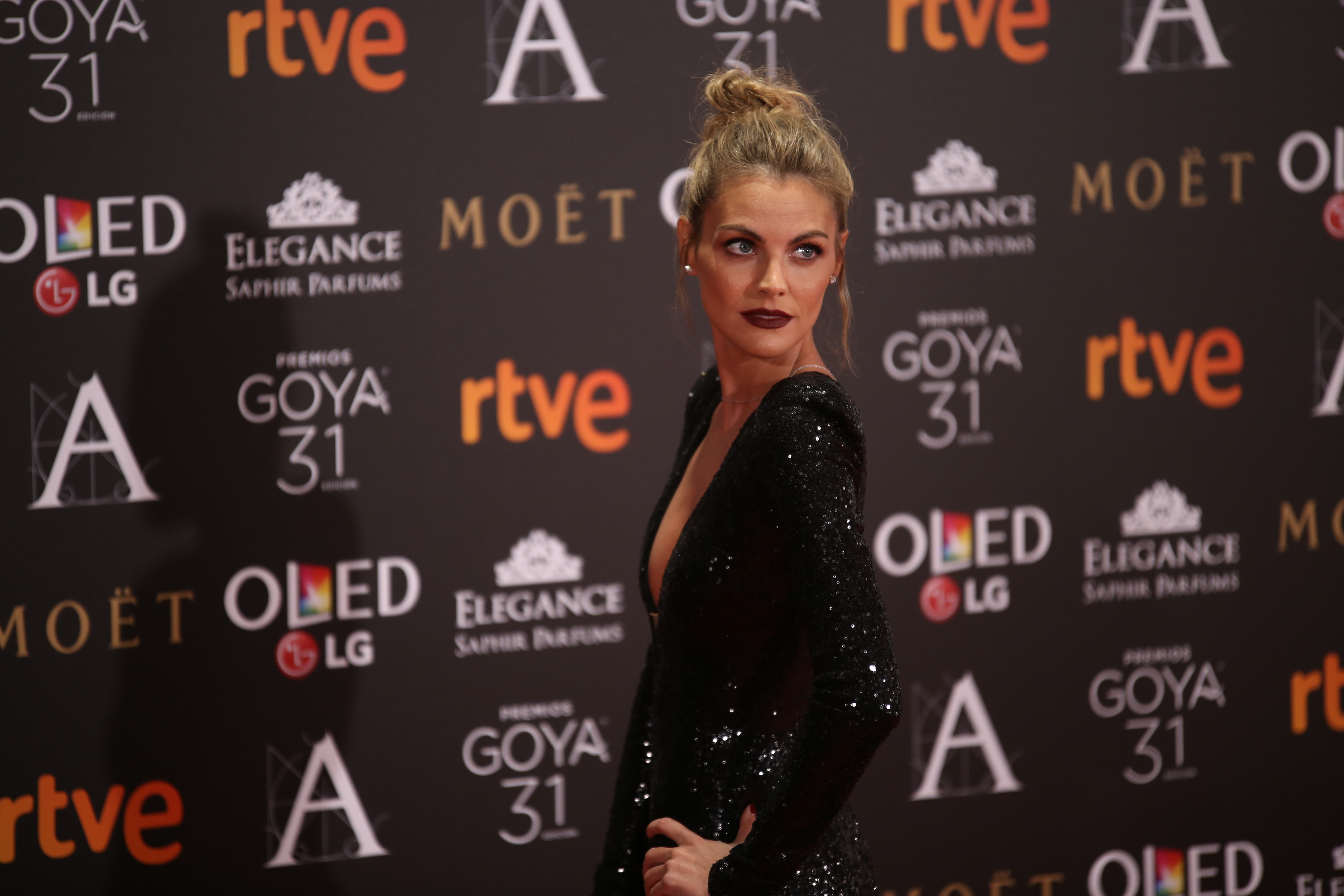 Premios Goya 2017